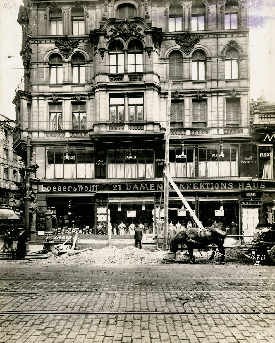 Berlin, Foto aus der Zeit des U-Bahn-Baus 1907–1915; ca. 28 x 23 cm. Mit Datum rechts unten. Chauseestraße 21 (Max Fabisch Damenkonfektion, links Filiale von Loeser & Wolff) Tadellöser & Wolff ist ein Roman von Walter Kempowski, in dem der Autor Erinnerungen an seine Kindheit und Jugend während der Jahre 1938 bis 1945 verarbeitet. Das Werk erschien 1971 und bildet den vierten Teil der Deutschen Chronik. Der Titel ist von dem abgebildeten Tabakhandelsunternehnen Loeser & Wolff abgeleitet.